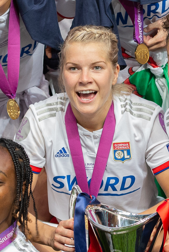 Fußball, Frauen, UEFA Women's Champions League, Olympique Lyonnais - FC Barcelona; Olympique Lyonnais feiert den erneuten Titel; Jubel, celebration